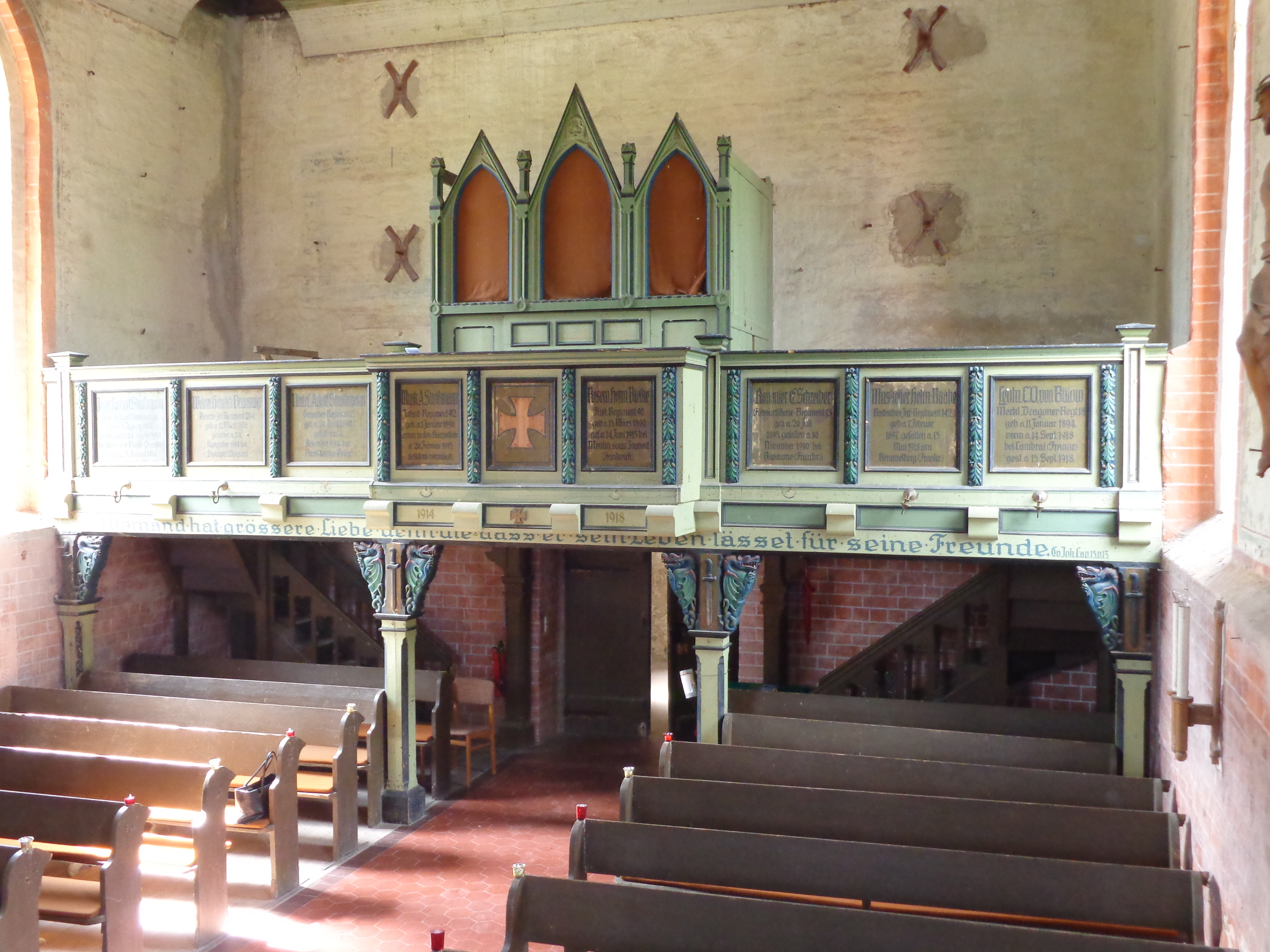 Orgelempore der Dorfkirche Dobbin